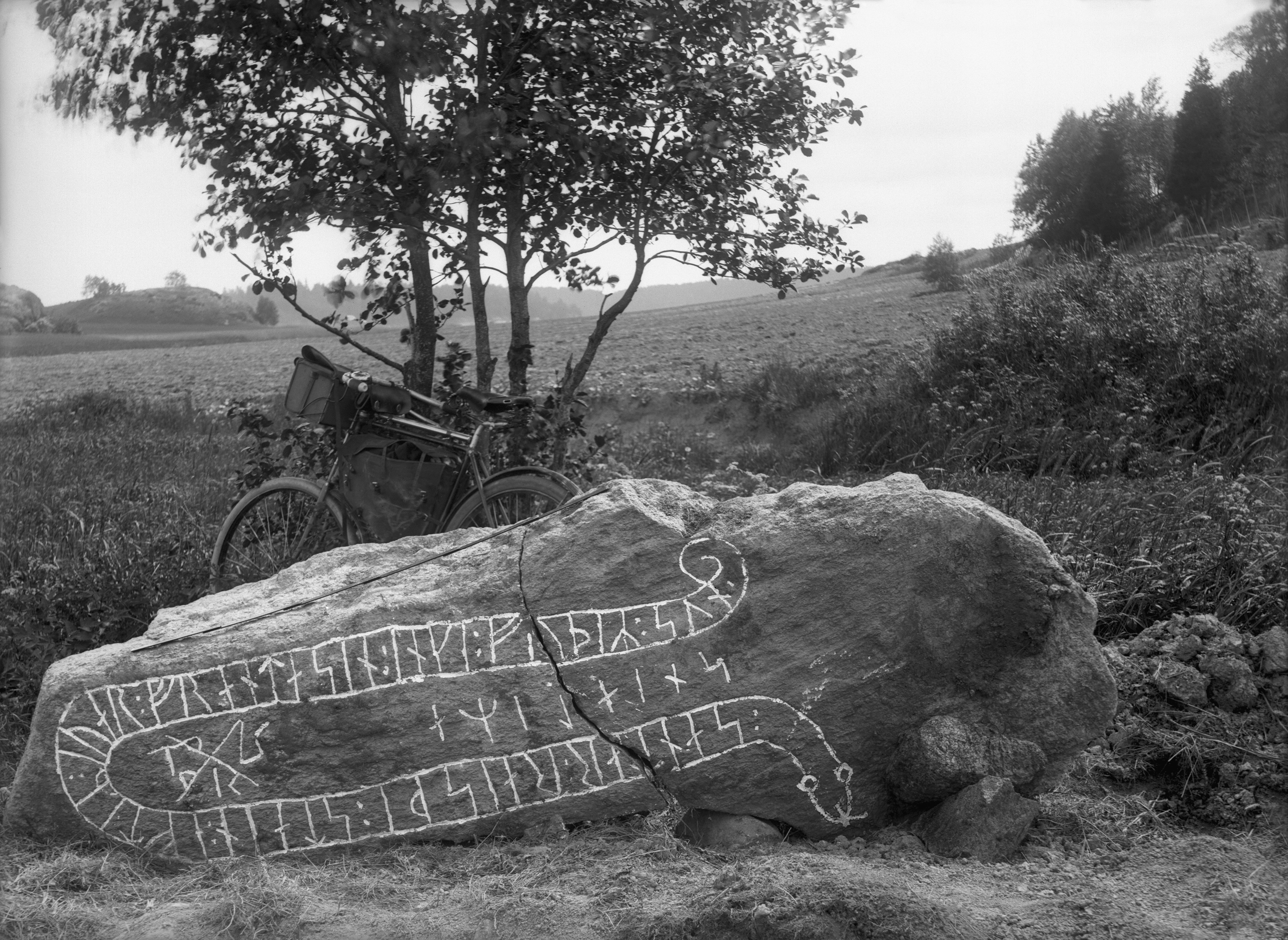 Fallen rune stone (Sö 140) at Korpbron (the Ravens' Bridge) in Juresta. The inscription says: "Sandar raised the stone in memory of Joar (or Ivar), his kinsman. No-one will bear a more able son. May Tor(?) safeguard(?)". Behind the rune stone stands a bicycle, probably the photographer's. Omkullfallen runsten (Sö 140) vid Korpbron (Korpa bro) i Juresta. Ristningen säger: "Sandar reste stenen efter Joar (eller Ivar) sin frände. Ingen föder en käckare son. Tor skydde (vården)!". Bakom runstenen en cykel, troligen fotografens. Parish (socken): Ludgo Province (landskap): Södermanland Municipality (kommun): Nyköping County (län): Stockholm Photograph by: Erik Brate Date: 1899 Format: Glass plate negative Persistent URL: Read more about the photo database (in english)